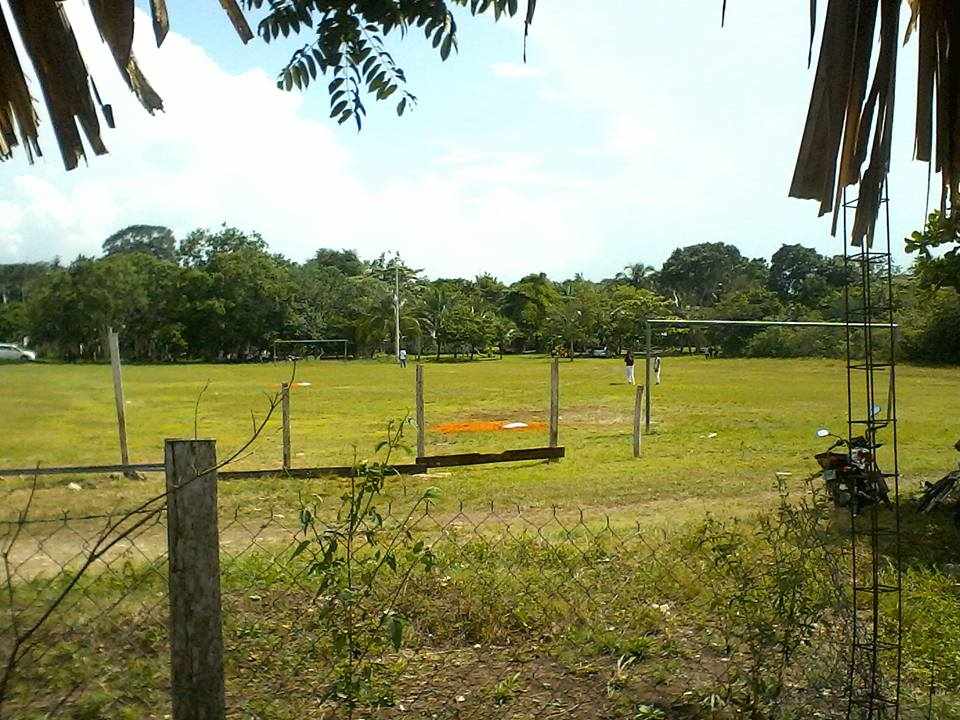 Tres Garantias campo